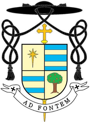 Escudo de Pbro. Franklin Luza